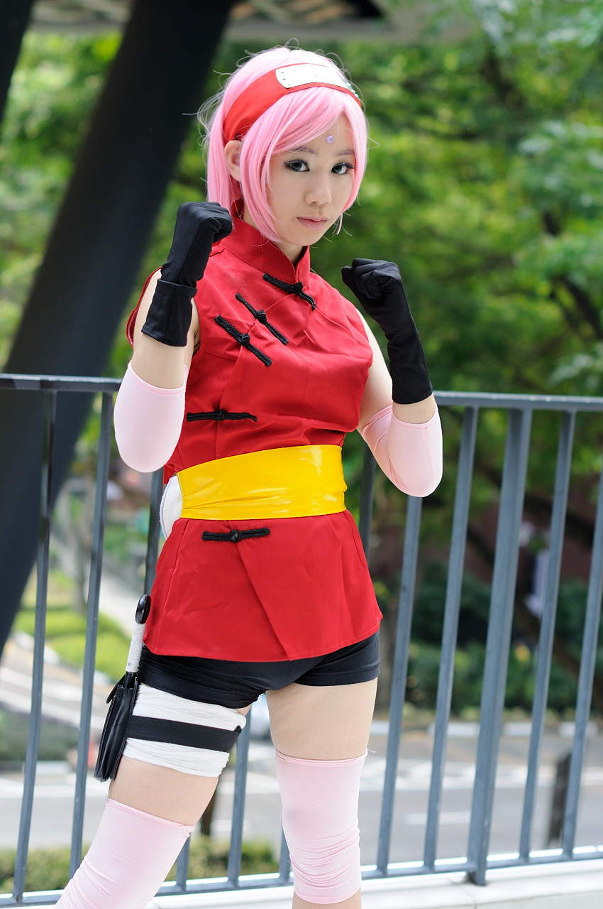 International Cosplay Day Singapore，《火影忍者》春野櫻cosplayer。